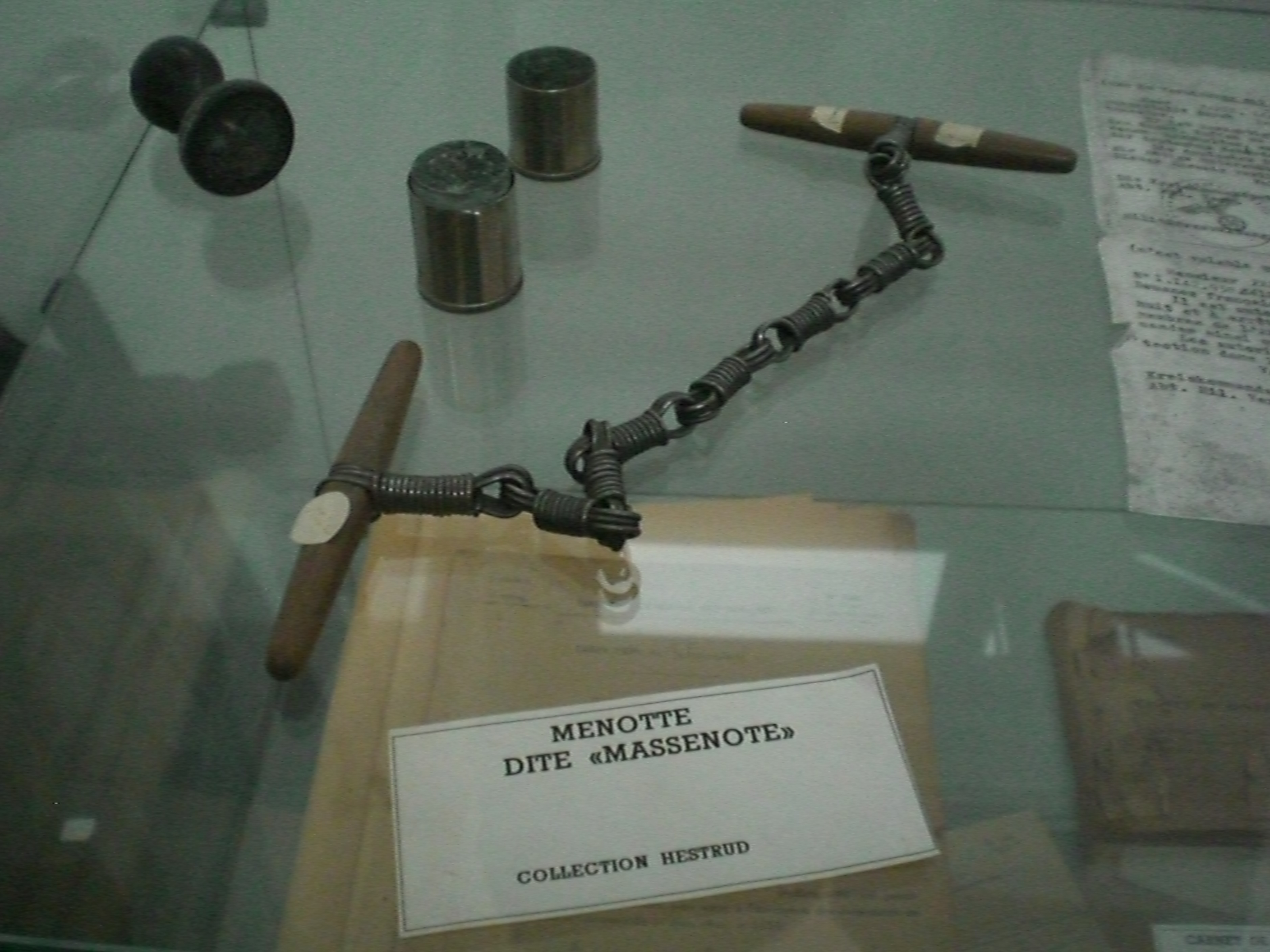 menottes dites "massenottes" ou "pinces de Massenot" au musée de la douane à Hestrud